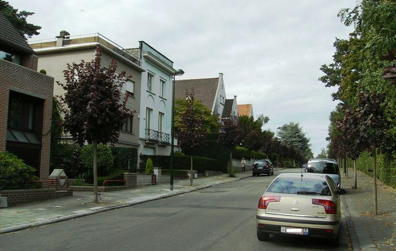 Av Geyskens Auderghem Belgium - part 3